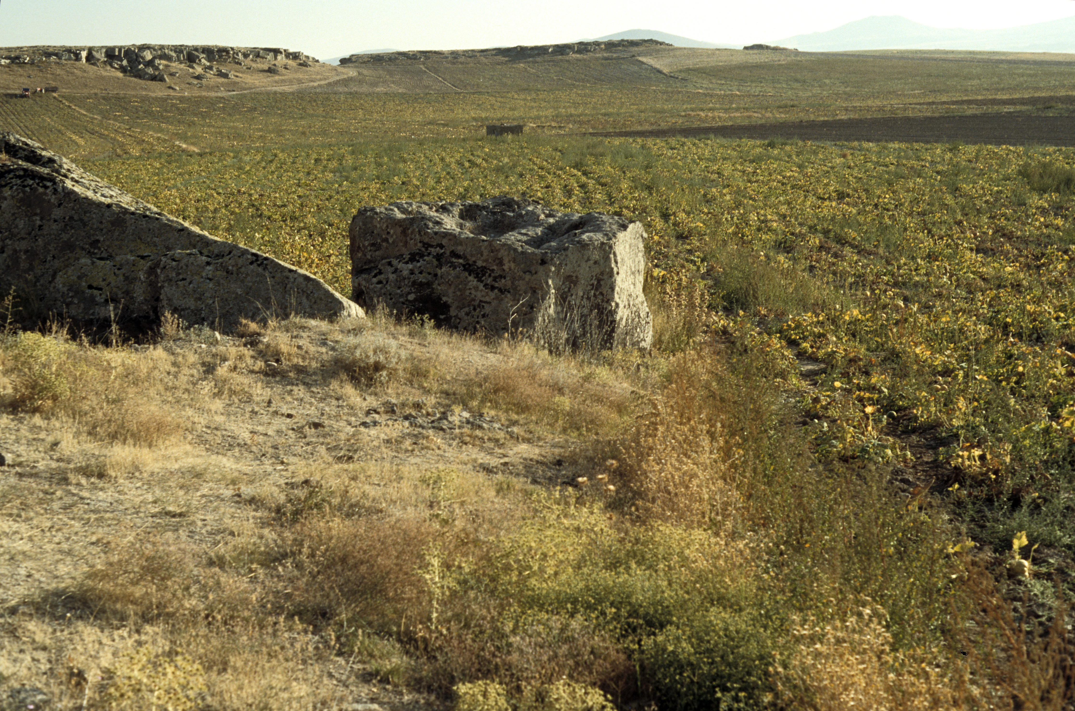 Suvasa, Hieroglyphen-luwischer Inschriftenstein bei Gökçetoprak, Gülşehir, in Kappadokien, Zentraltürkei. Stein von hinten mit Vertiefungen in der Oberfläche